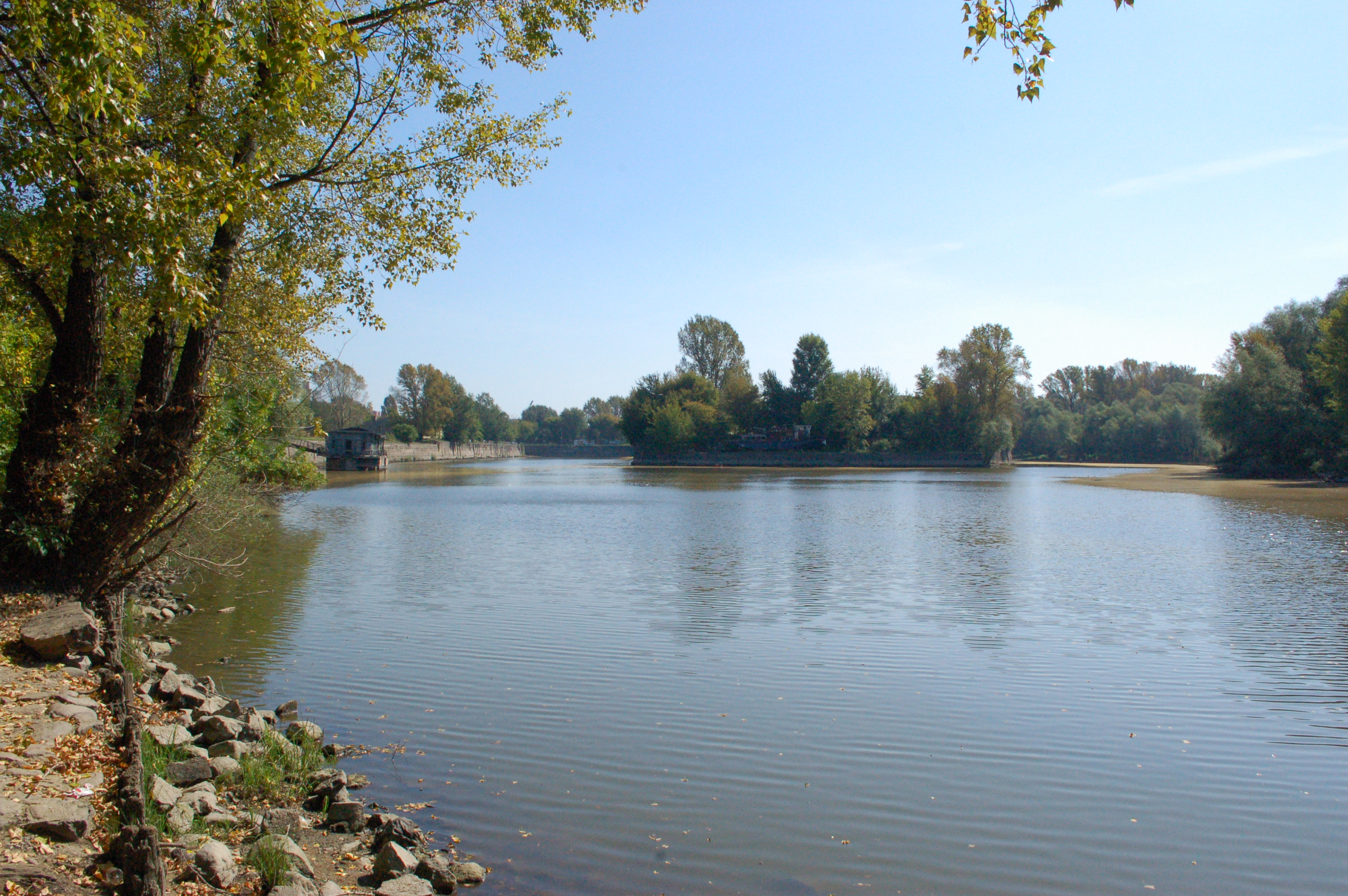 Hafen Praga, Warschau